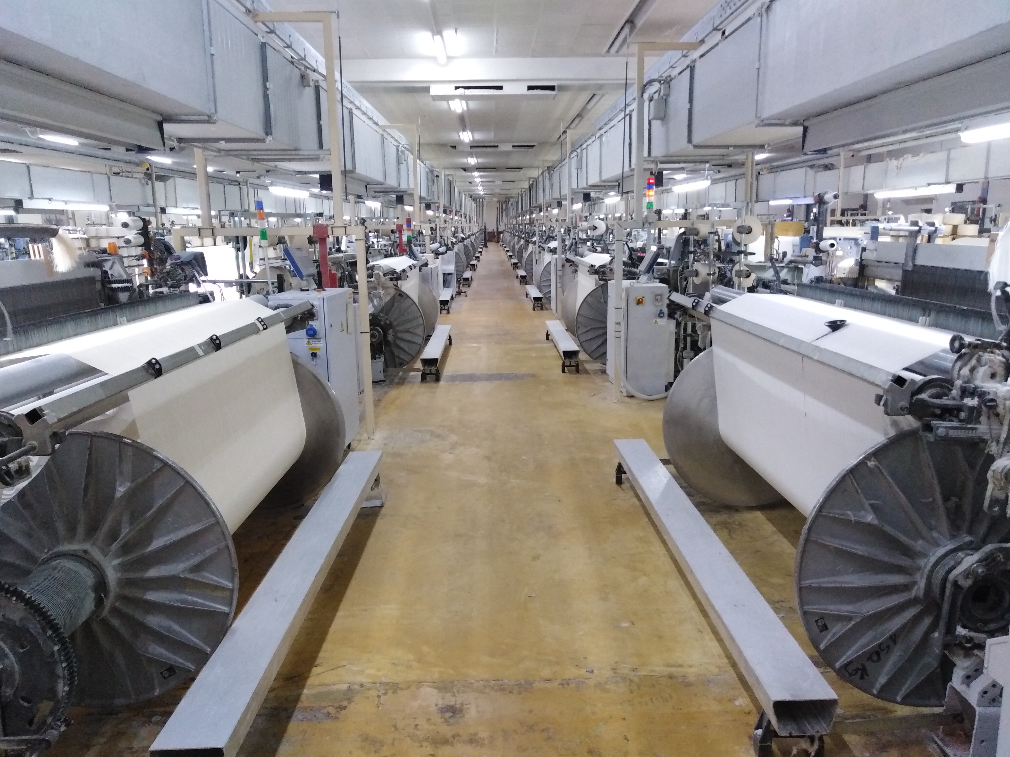 LM Firma Lauffenmühle in Lauchringen. Produktionshalle. (Tag der Offenen Tür am 4. Mai 2019).